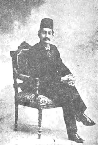 امیراصلان خان نظام السلطان (خواجه نوری) حاکم و نماینده مجلس دوره قاجار